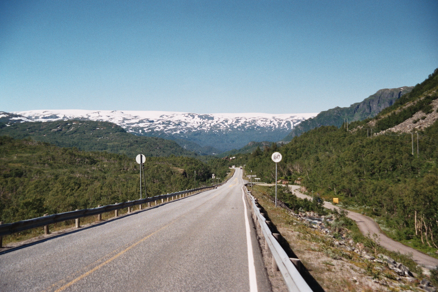 Folgefonna Gletscher in Hordaland / Norwegen von E134/N13 Røldal - Odda gesehen